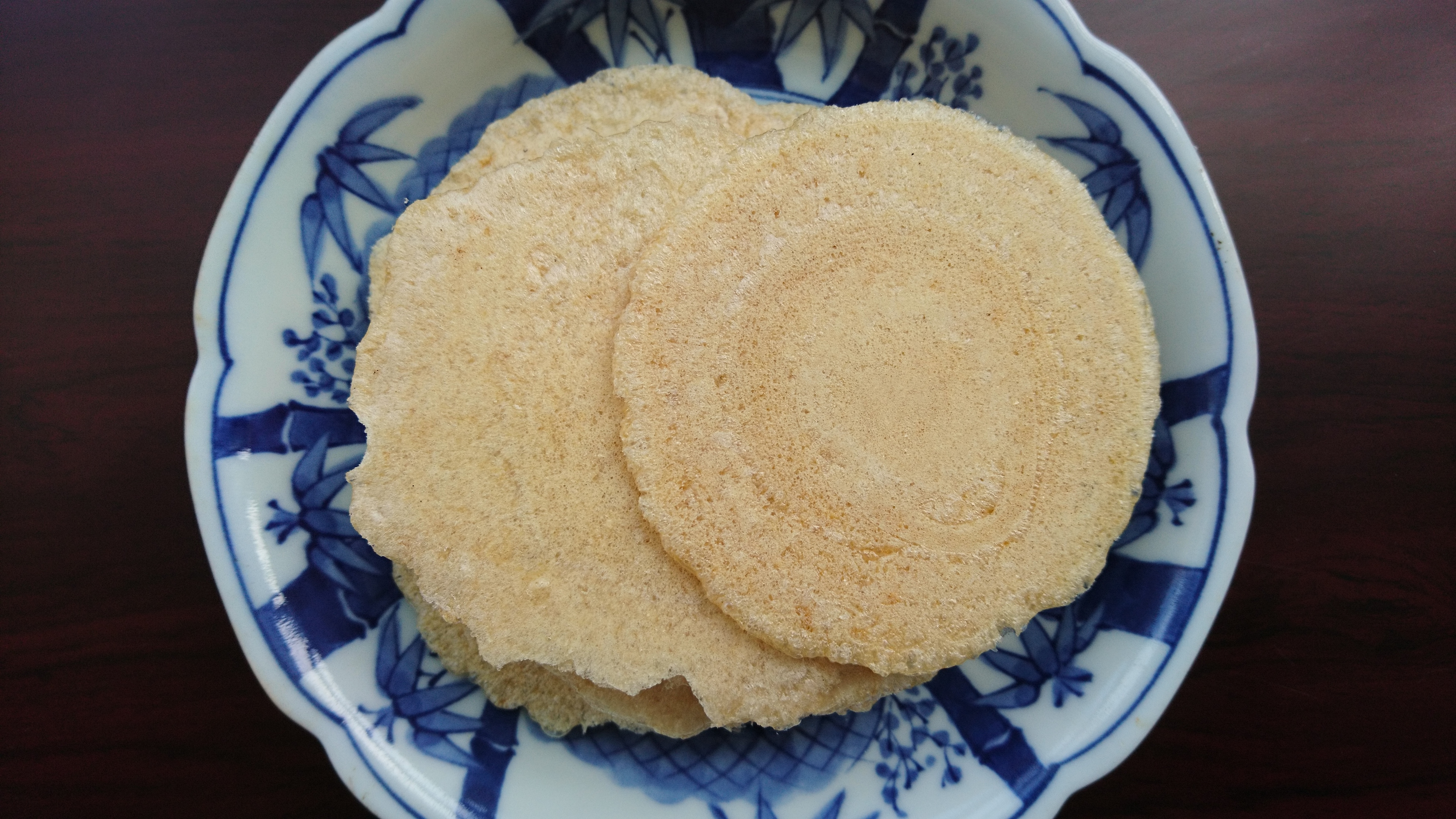 京都府京丹後市久美浜町の特産品